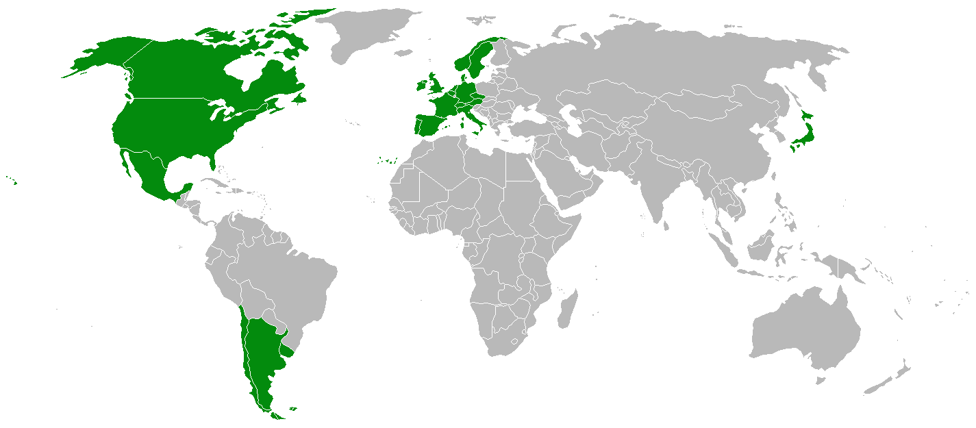 Países en los que se han editado y/o distribuído alguno de los álbumes de Negu Gorriak.